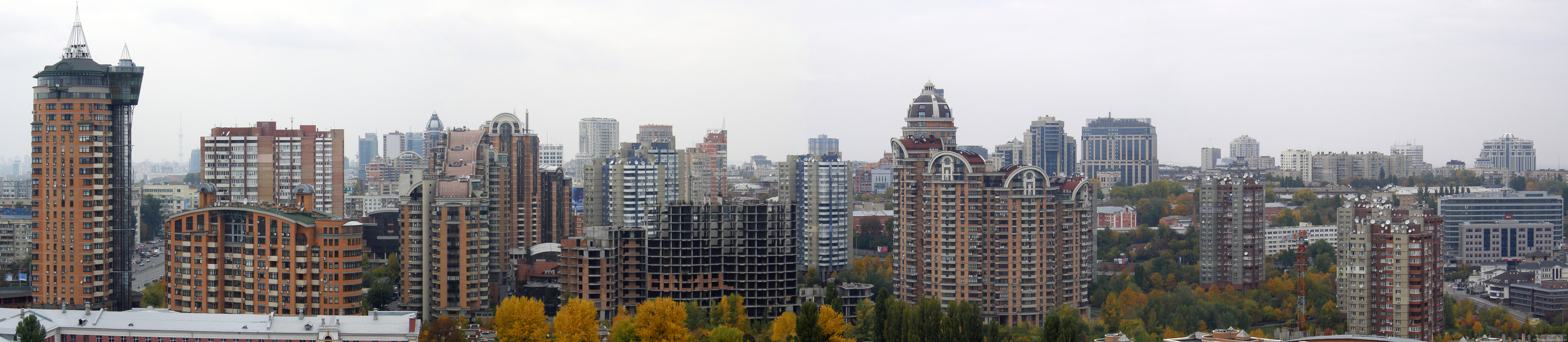 многоэтажная часть Царского села